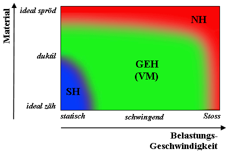 Spannungshypo